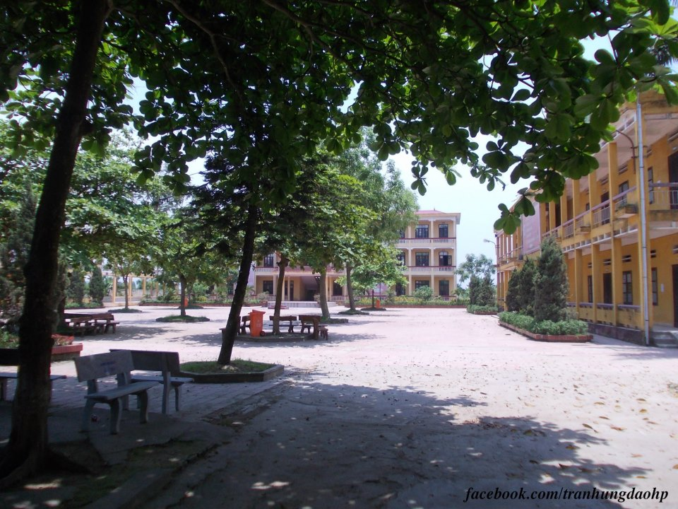 Một góc sân trường THPT Trần Hưng Đạo, Hải Phòng